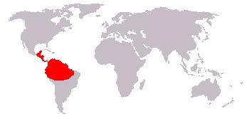 Bewerking afbeelding: Afbeelding_(kaart).JPG